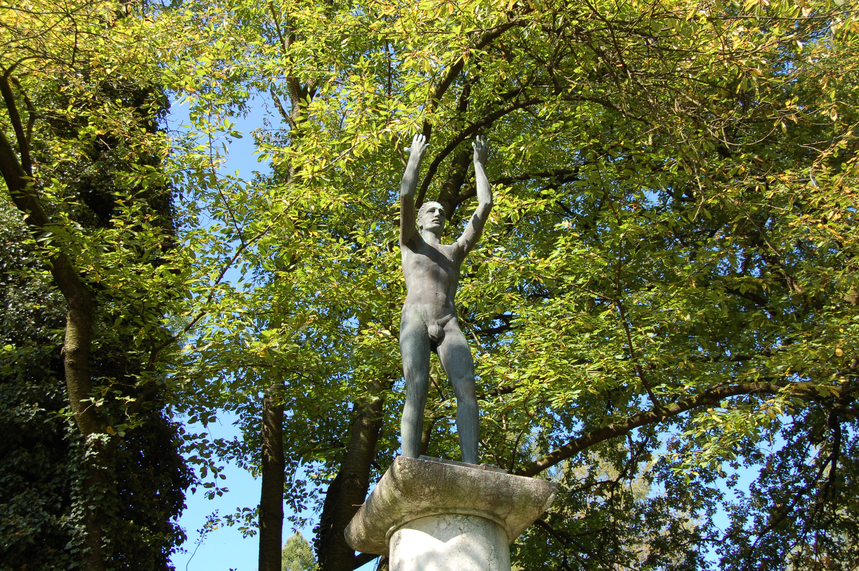 Der denkmalgeschützte Fliegerdenkmal bei der Römerstraße 83 in Linz (Oberösterreich).